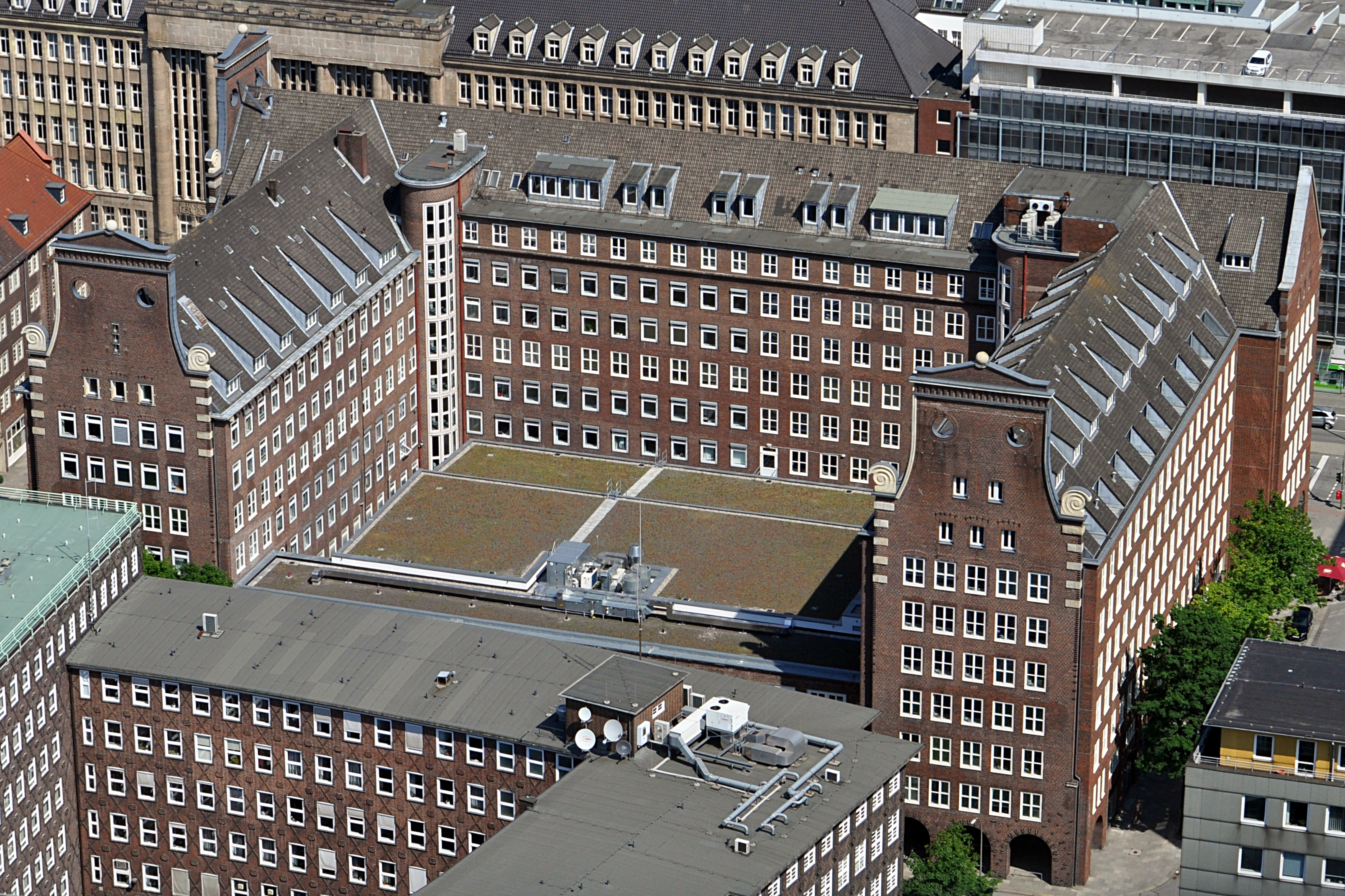 Das Bartholomayhaus in Hamburg-Altstadt. This is a photograph of an architectural monument.